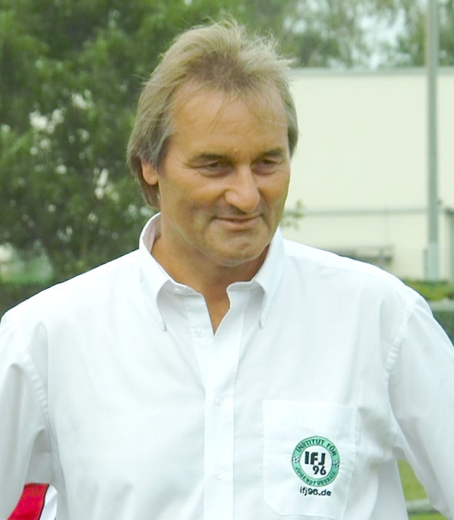 Peter Schreiner war 25 Jahre Fußballtrainer, veröffentlichte zahlreiche Artikel in Fachzeitschriften, sowie Bücher und DVDs.